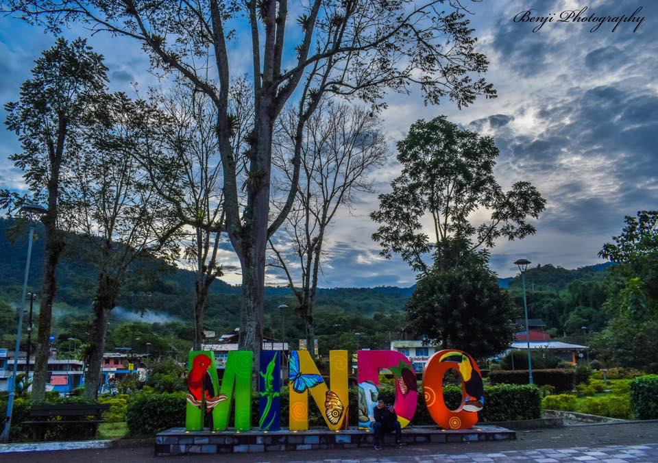 parque central de Mindo